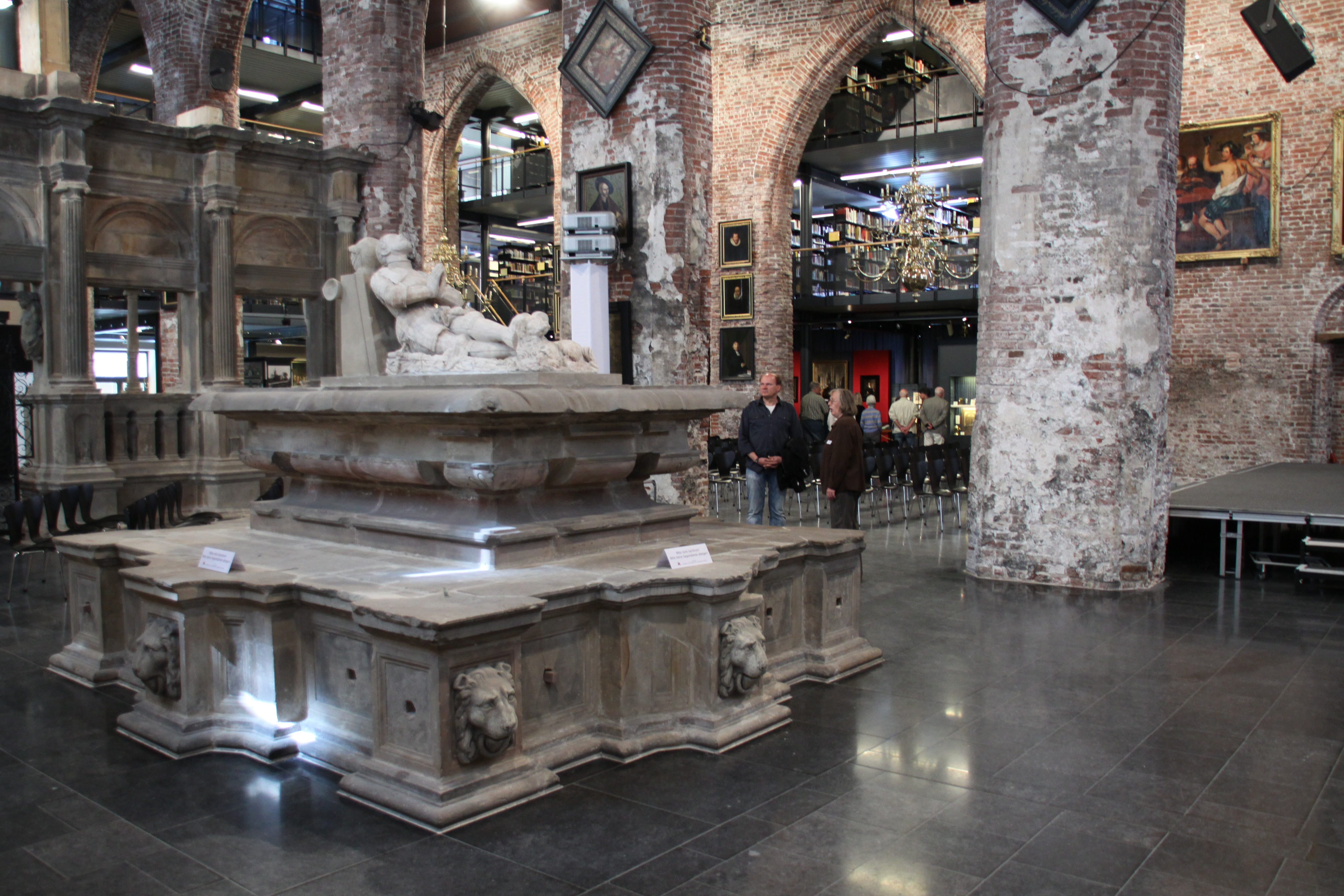 Grabmal des Grafen Enno II. in der Großen Kirche von Emden, heute Johannes-A-Lasco-Bibliothek